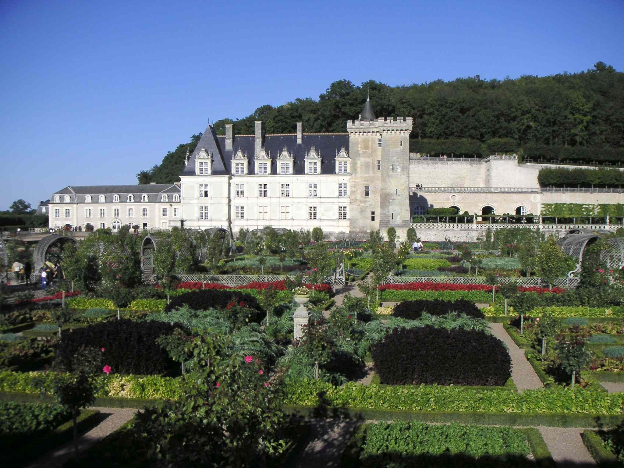 Le château de Villandry (France) vu des jardins